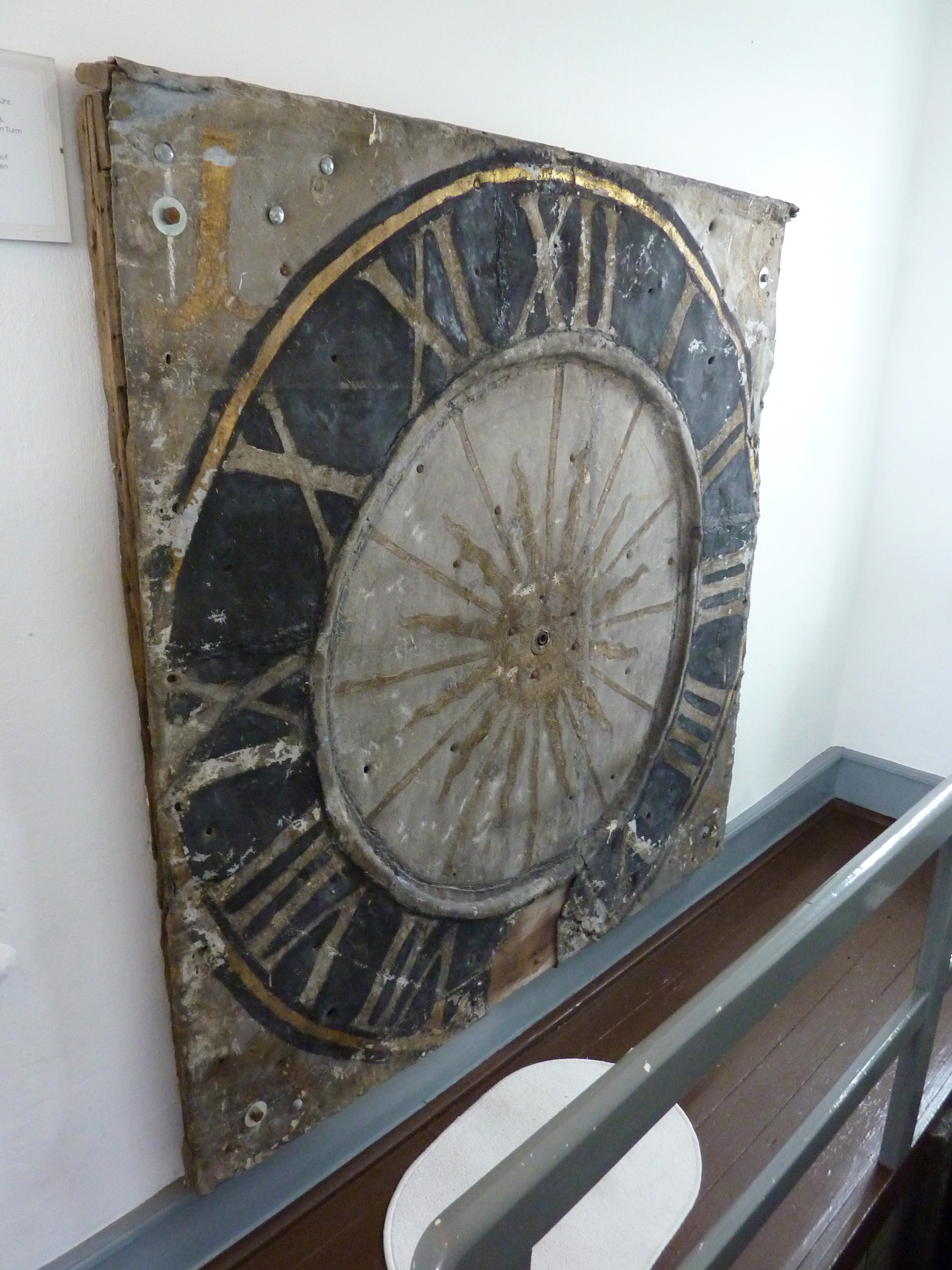 Evangelische Nikolaikirche in Siegen/Westfalen: Zifferblatt der Turmuhr aus dem 16. Jahrhundert, Bleiblech auf Eichenholz, ausgestellt in der Glöcknerstube in der Turmspitze.